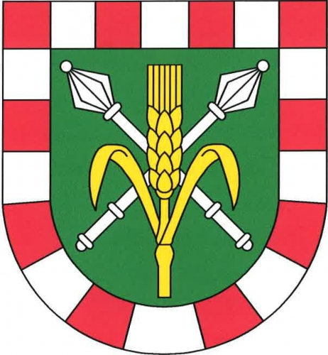 znak, Třebeň, okres cheb